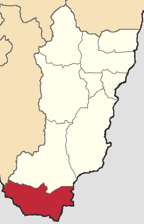 Mapa localizador del cantón en Zamora Chinchipe, Ecuador